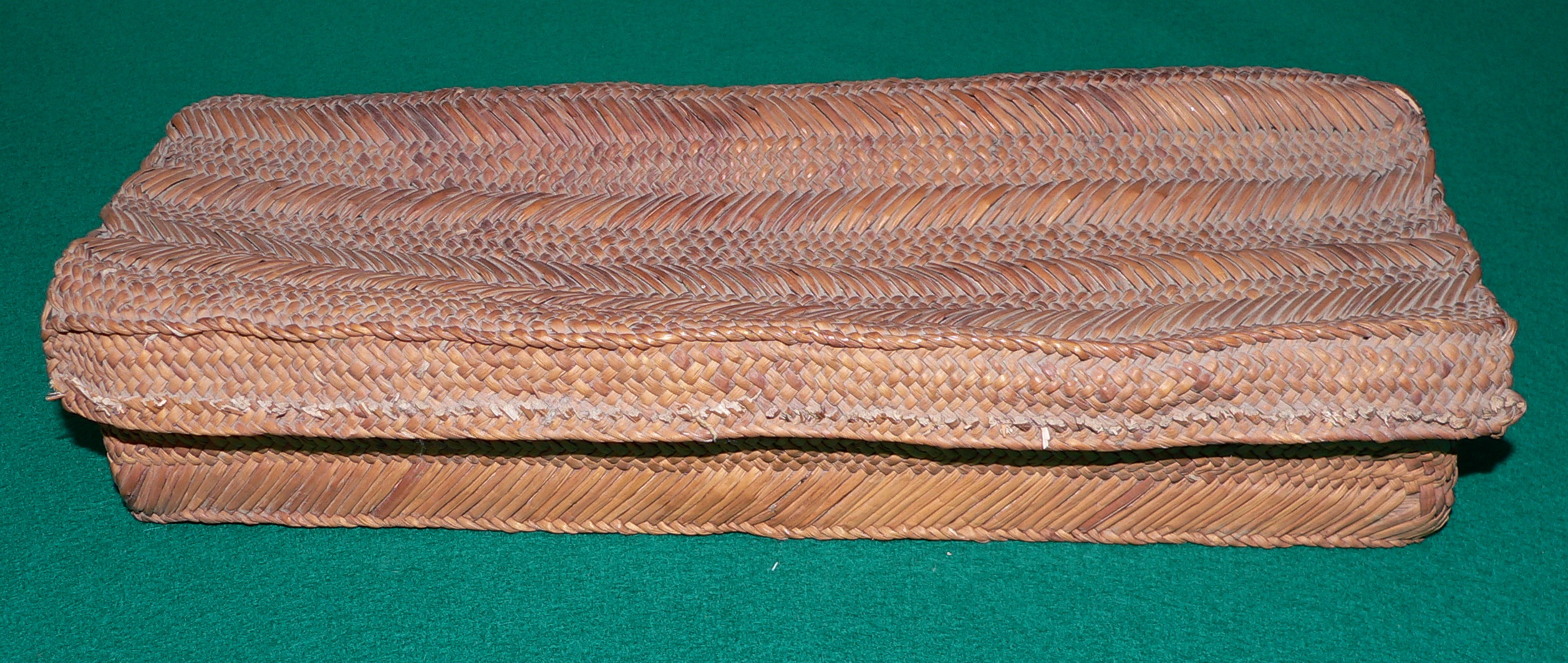 Descripción: Costurero de paja Antigüedad: Entre 1.200 y 1.470 d.C Cultura: Cultura Chancay País : Perú Fotógrafo: © Manuel González Olaechea y Franco Fecha de la foto : 25 de abril de 2008